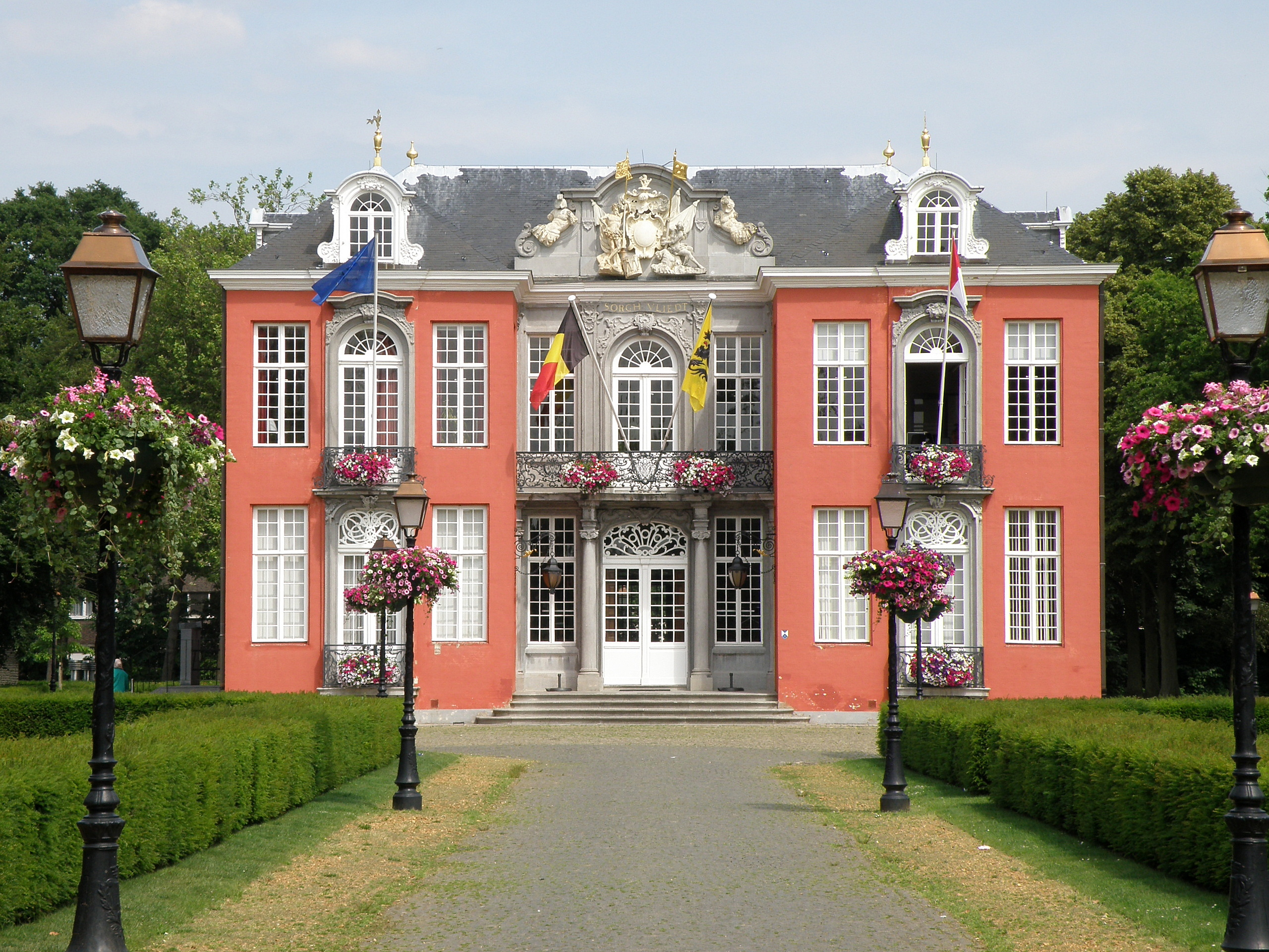 Antwerpen, district Hoboken. Kasteel Sorghvliedt, voorgevel (=westgevel).